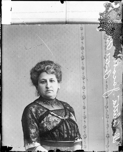 Aletta Jacobs (1854–1929)